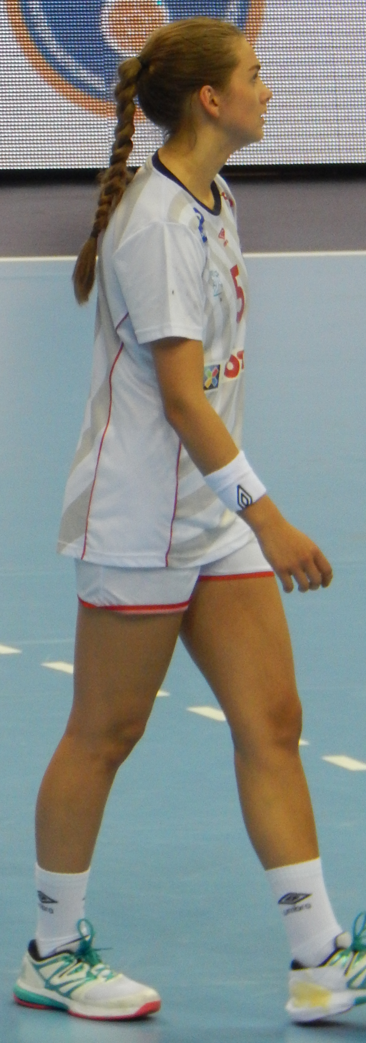 Норвежская гандболистка Хелена Гигстад Фауске, чемпионат мира по гандболу среди девушек до 20 лет. Групповой этап, группа A. Матч Венгрия - Норвегия